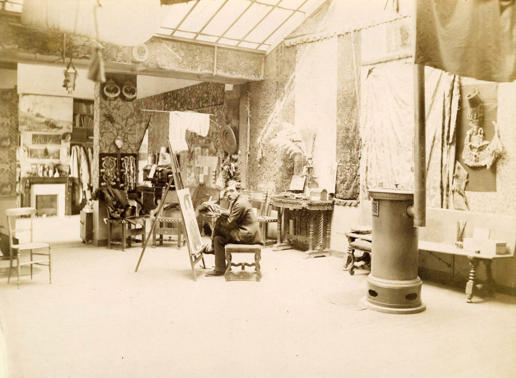 Emilio Sala Francés in his studio